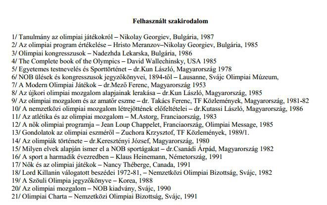 A hvg.hu online kiadványának Schmitt ügyről írt cikkének pdf melléklete, A kisdoktori disszertáció irodalomjegyzéke, képernyő mentés